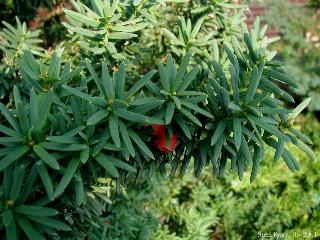 Taxus baccata 'Fastigiata' foliage